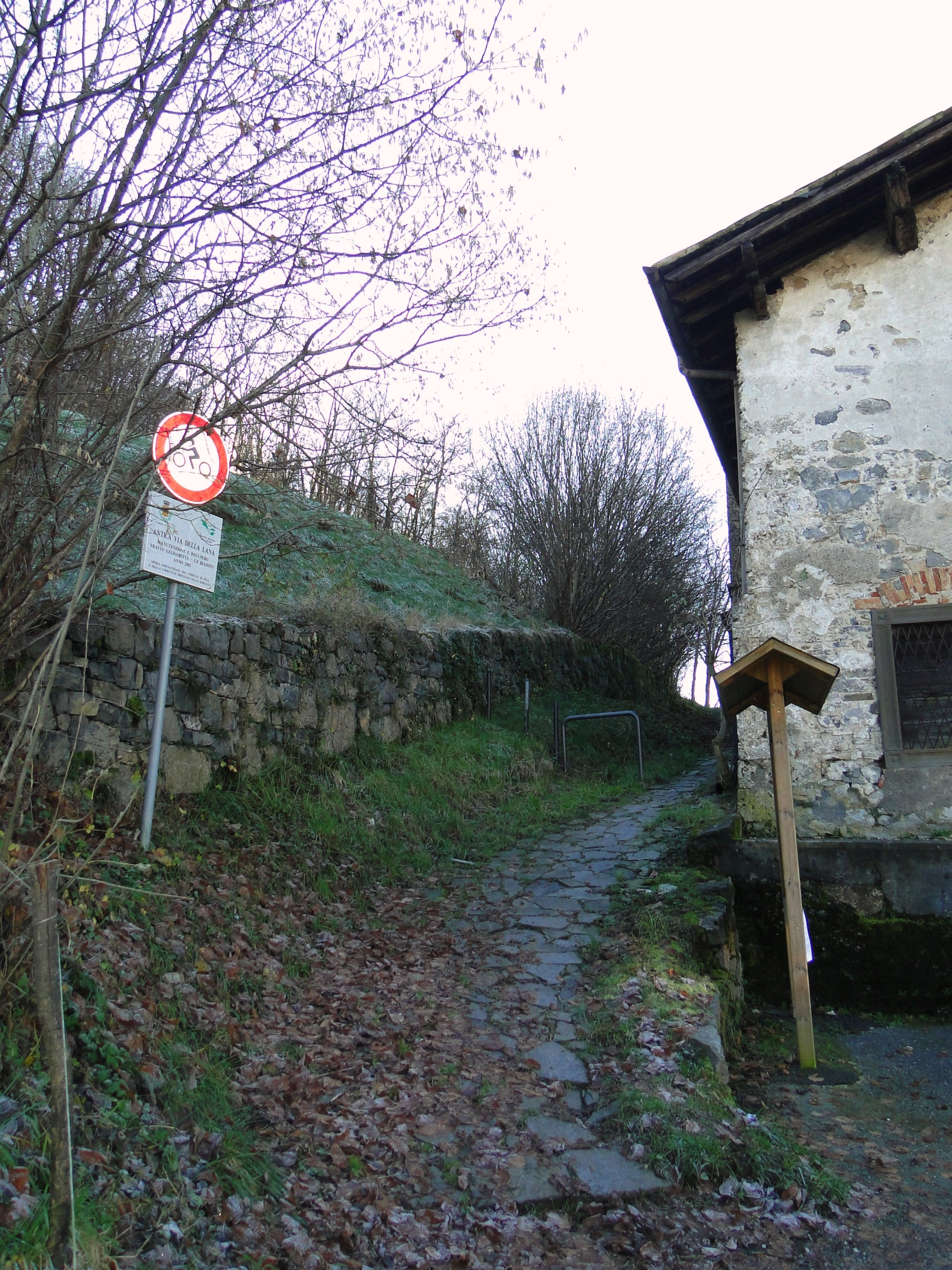 Sentiero della lana. Peia (BG). Italy